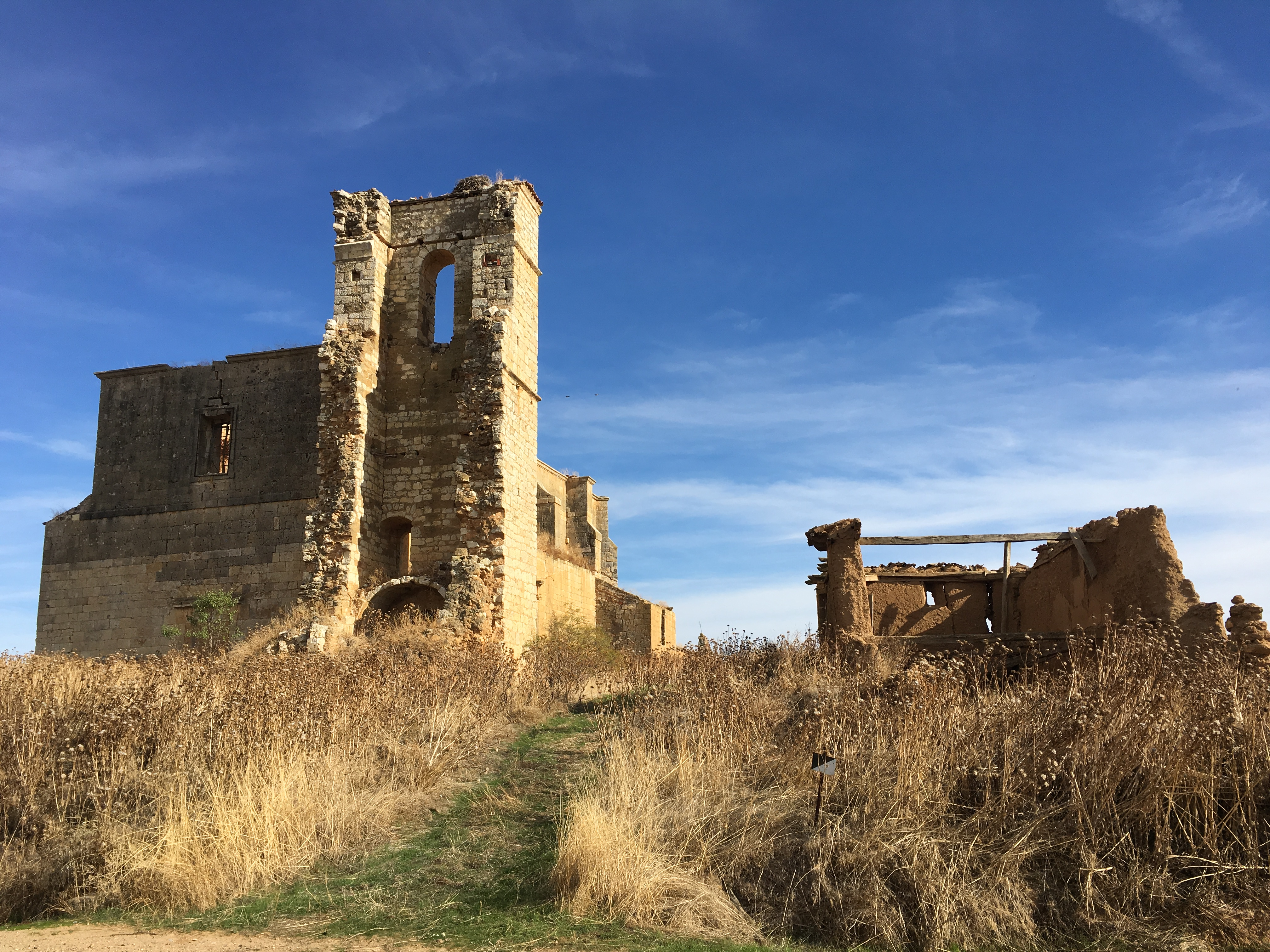 Villaesper Milenario